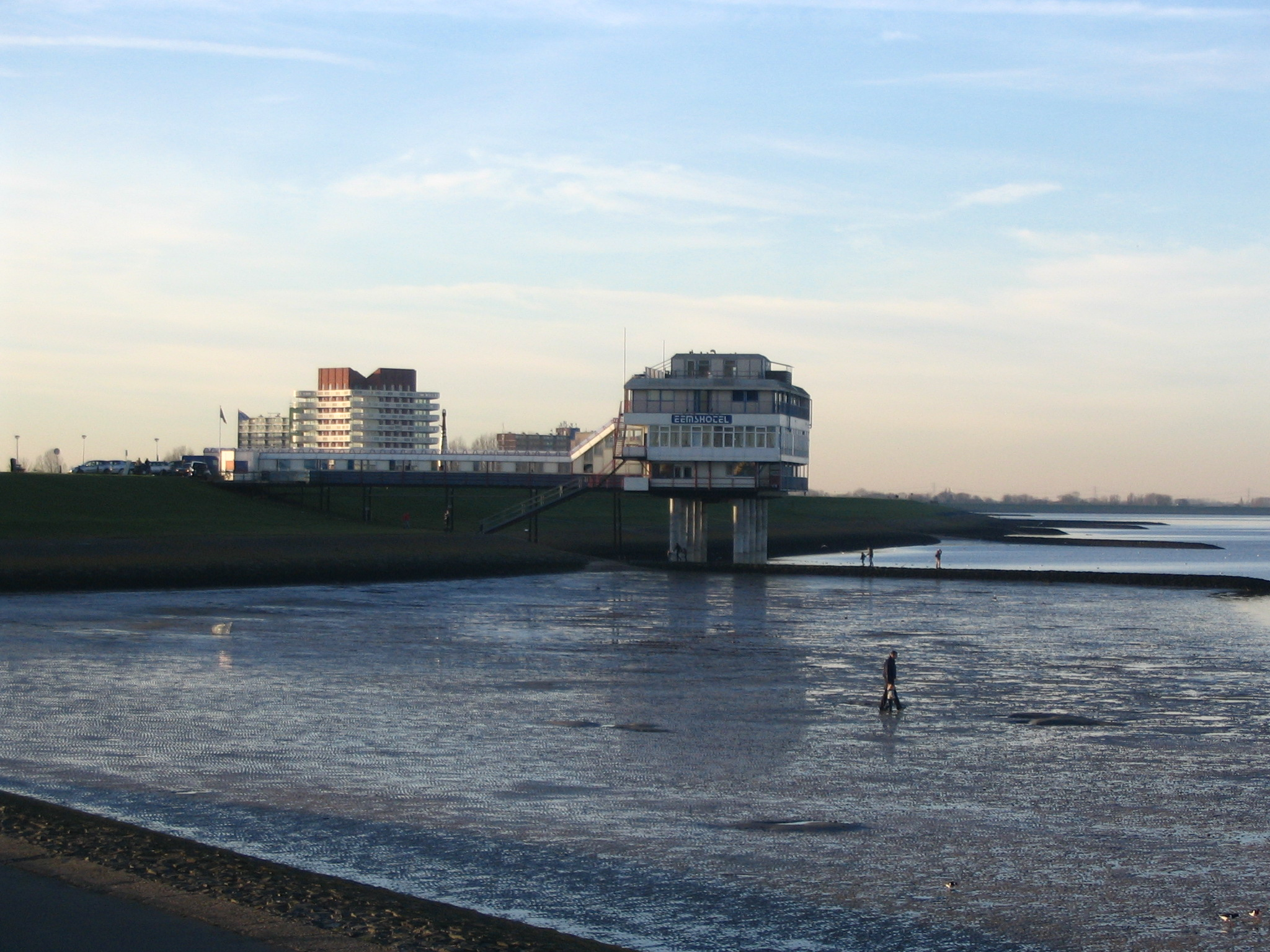 Het Eemshotel gebouwd in de Eems bij Delfzijl.